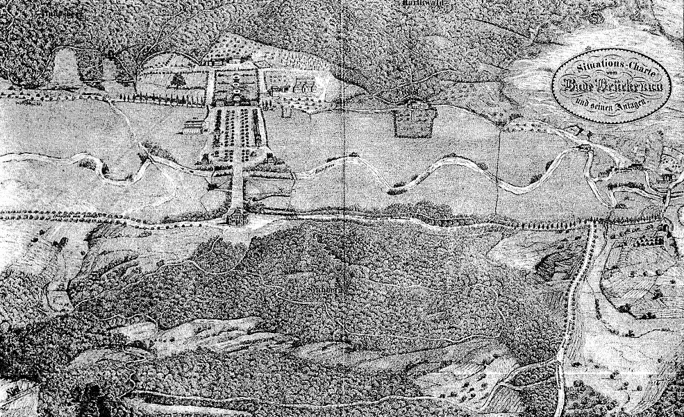 Staatsbad Brückenau